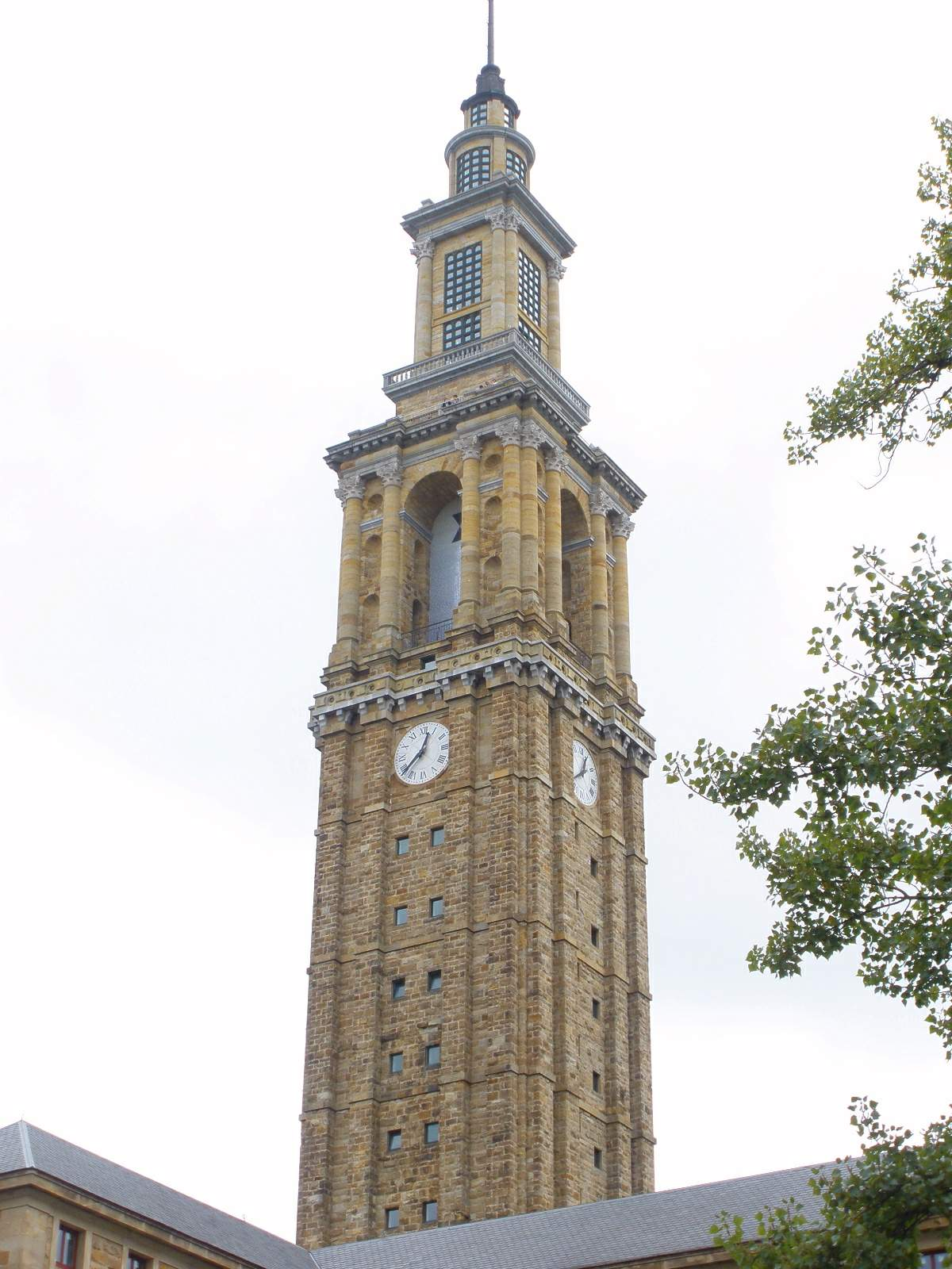 Gijón - Torre de la Laboral Ciudad de la Cultura (ex Universidad Laboral)